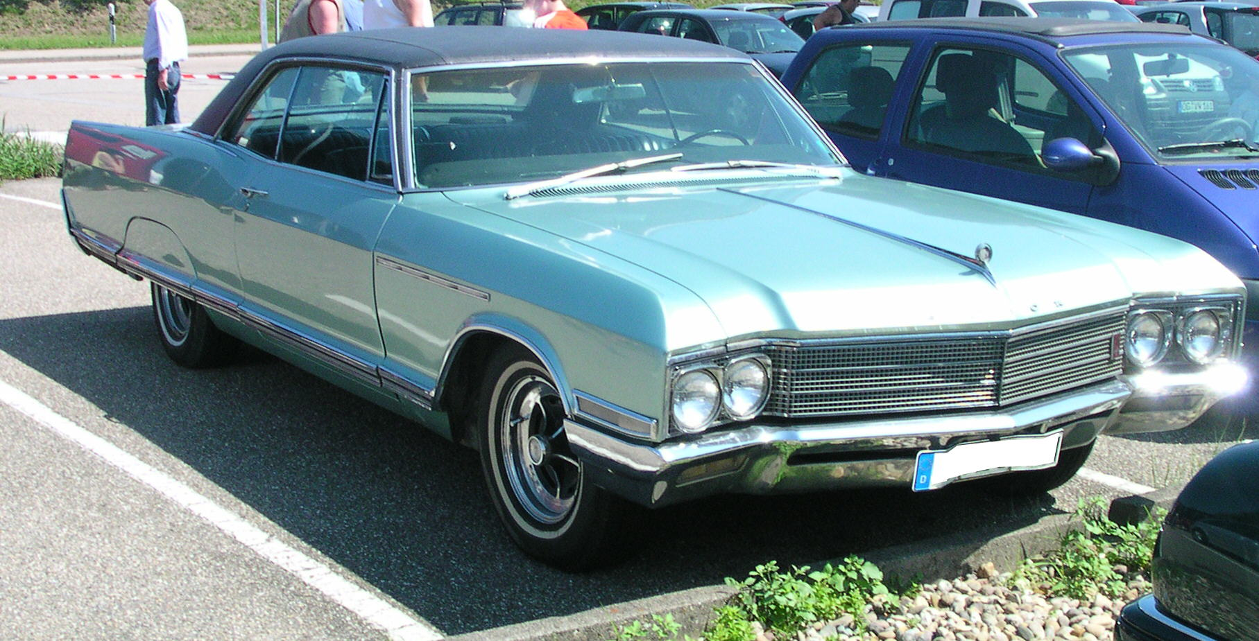 Buick Electra 225 Coupé von 1966 in Wörth am Rhein beim Oldtimer-Treffen bei Daimler-Chrysler